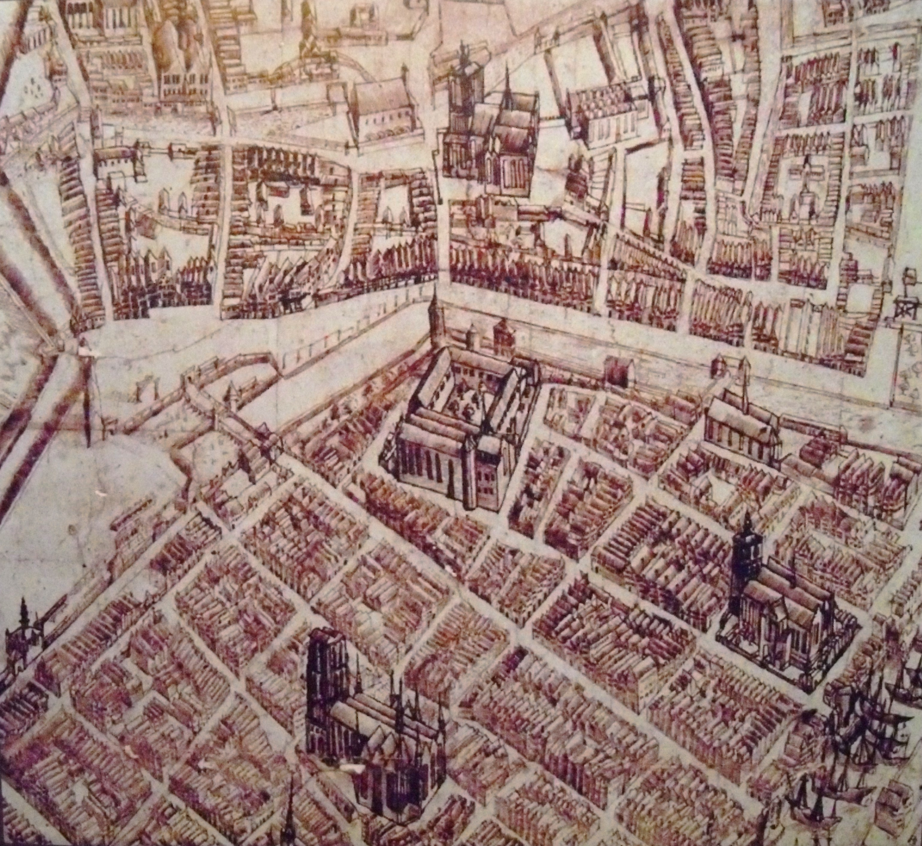 Gdańsk - fragment planu sztokholmskiego z 1601 r.